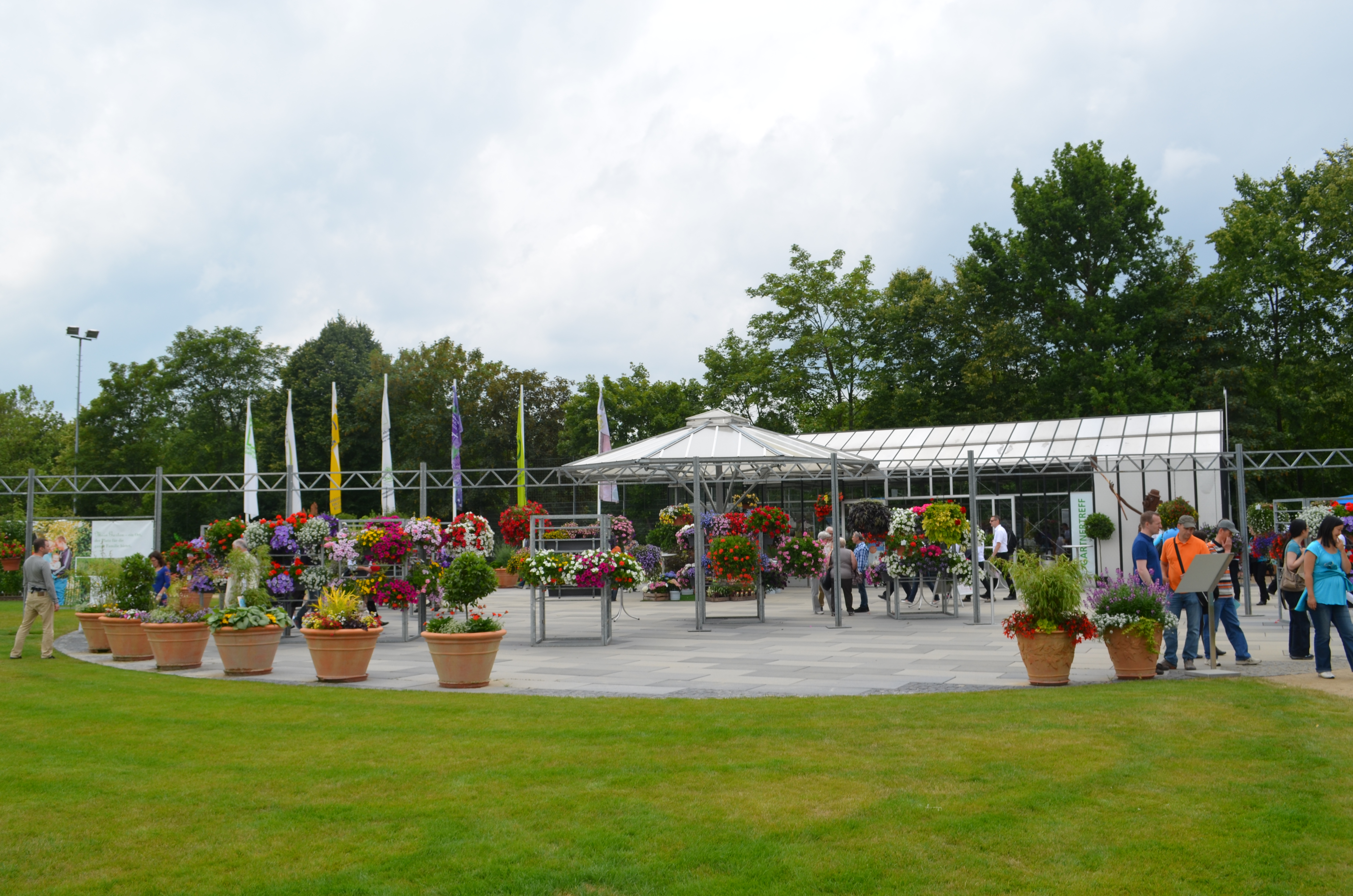 Gießen, Landesgartenschau, Wieseckaue, Gärtnertreff